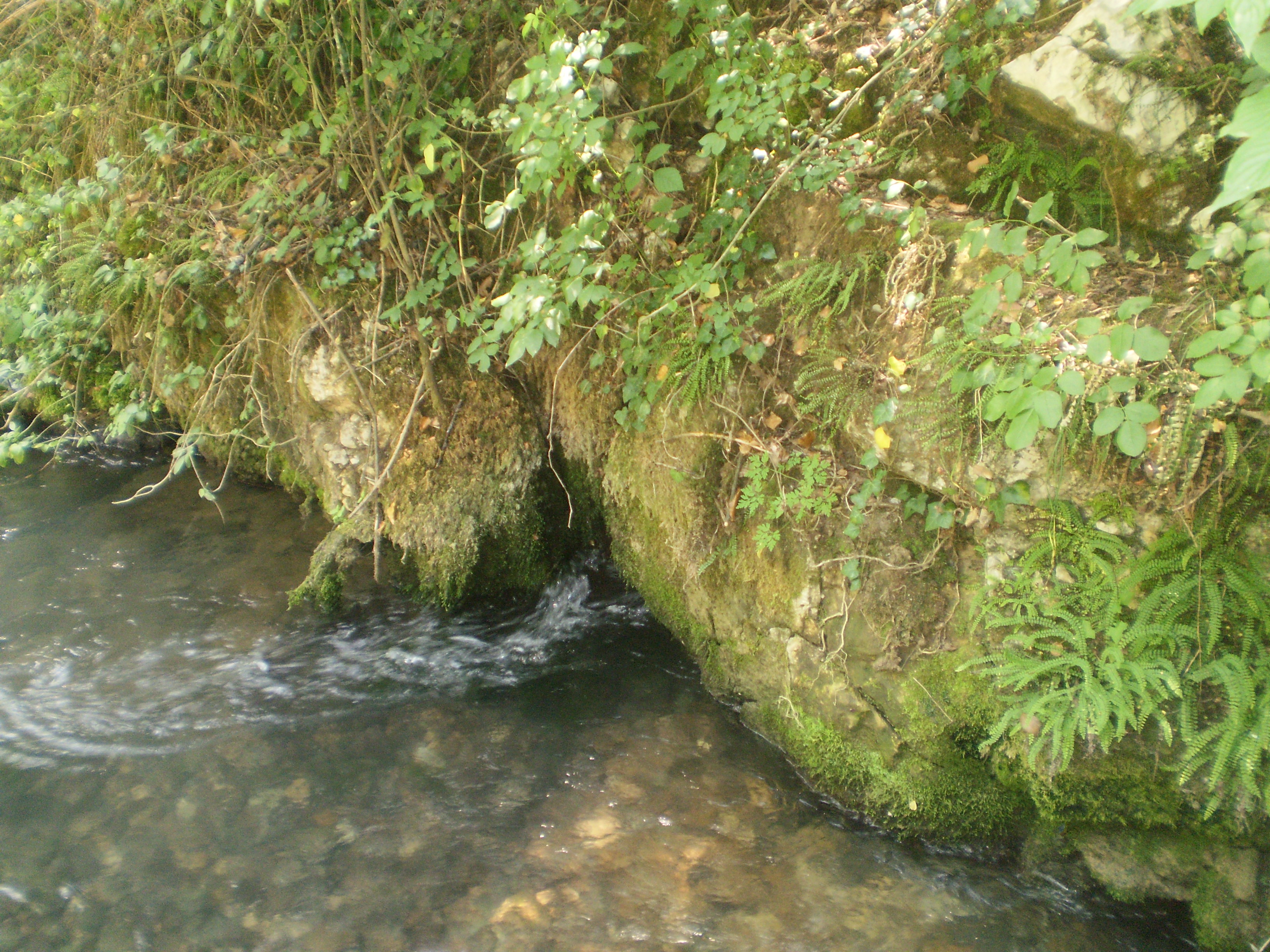 Српски (ћирилица): Врело Градца